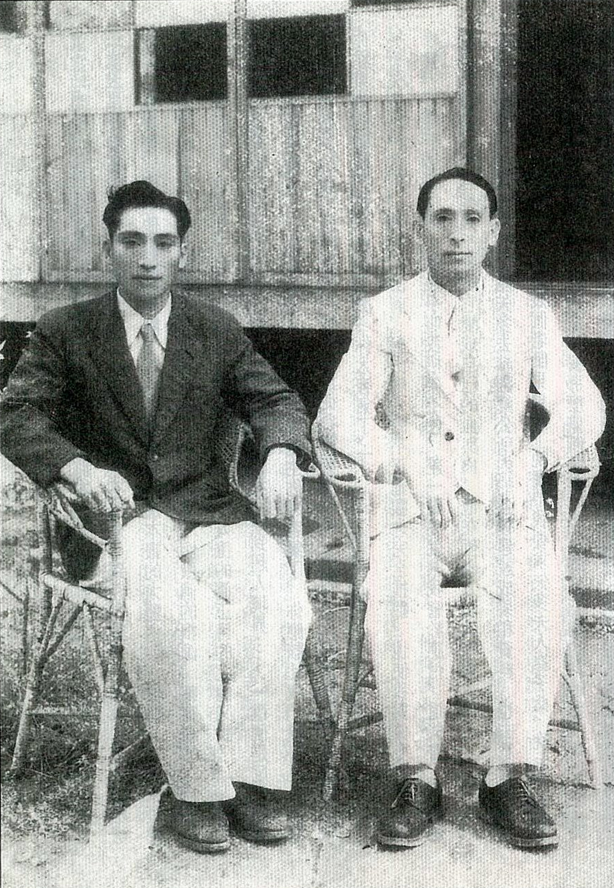 1908－1954; 1924－1954，兩人均於1954年慘遭中國國民黨政權殺害